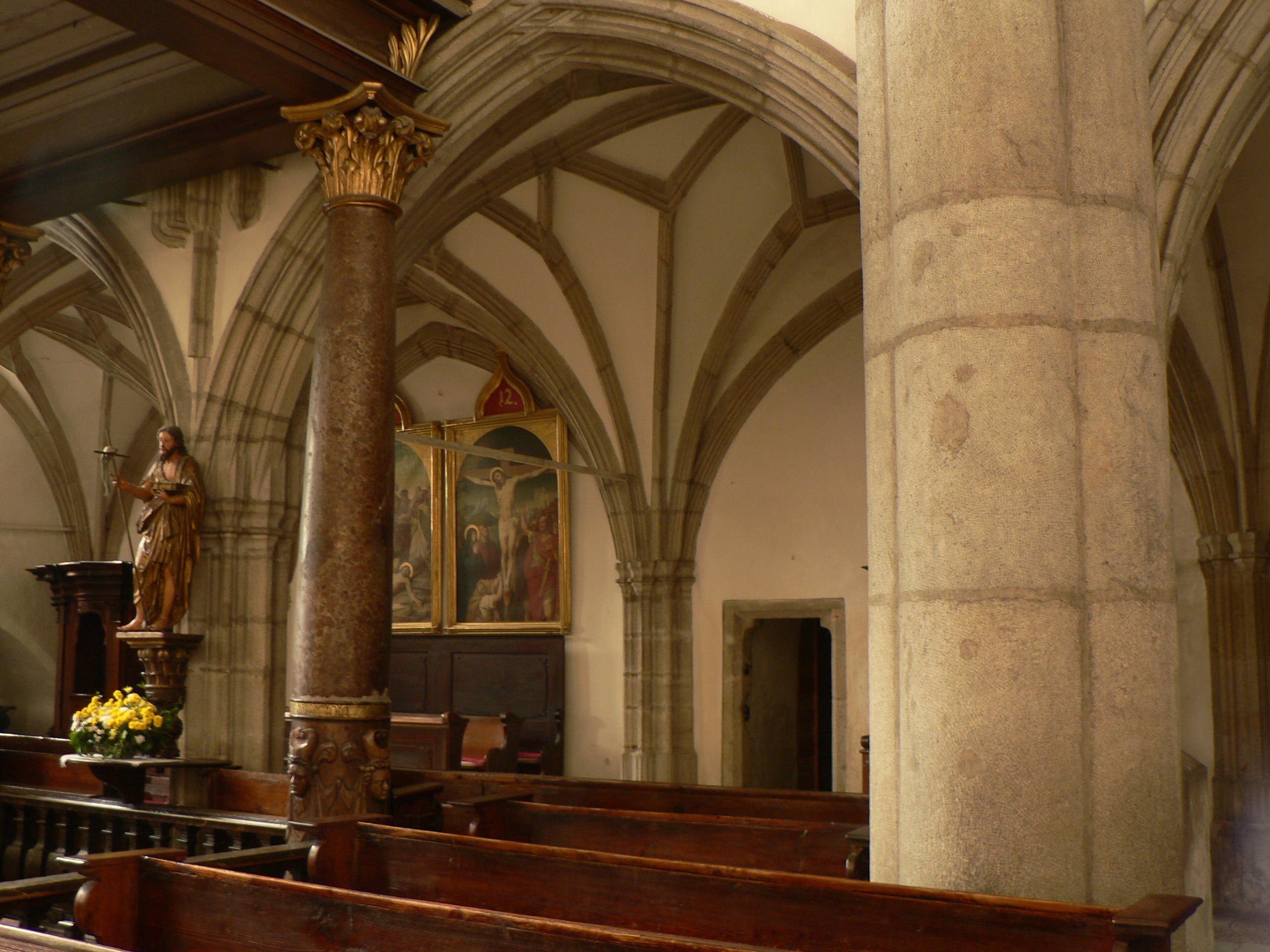 Kostel svatého Víta (Český Krumlov) - klenba pod kůrem